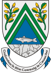 Escudo de Armas de la ciudad de Greystones.